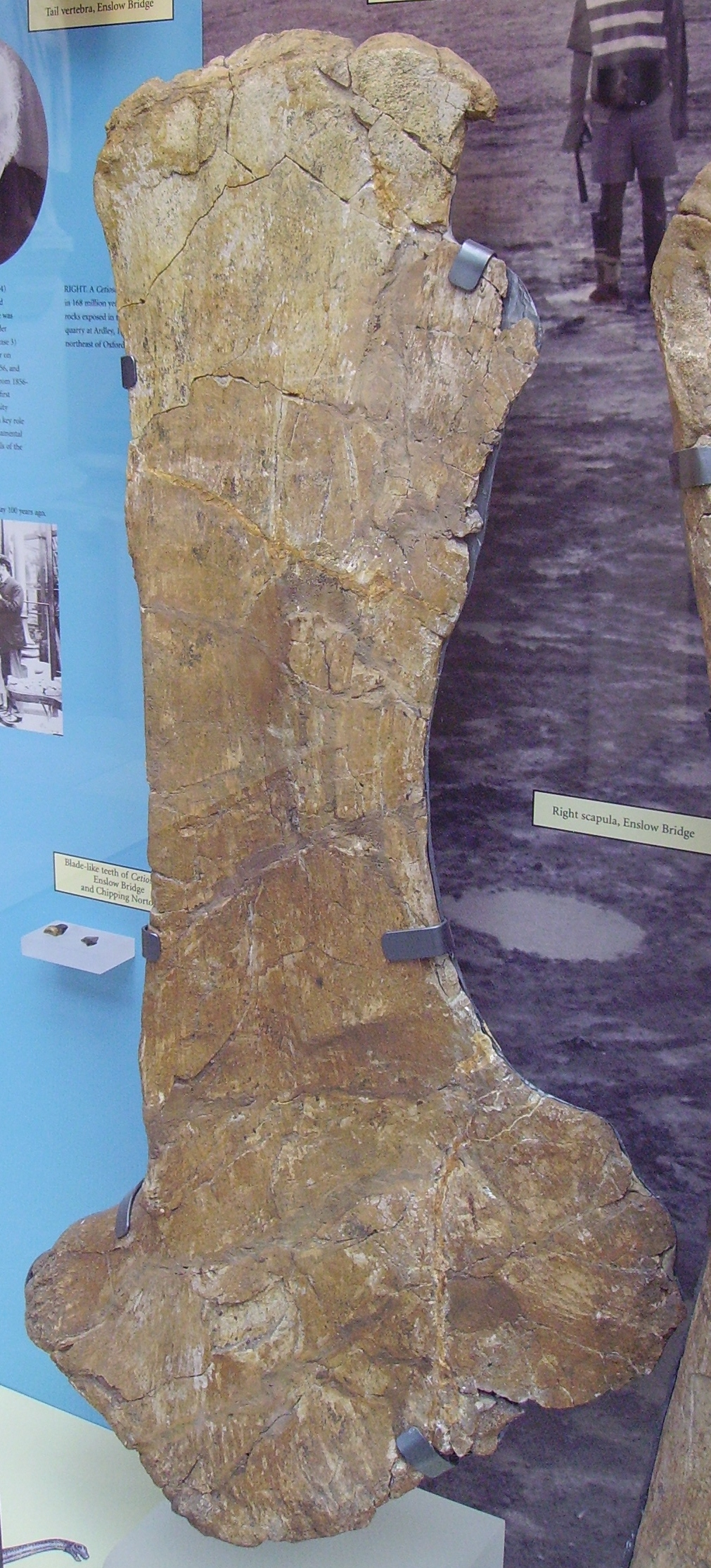 Cetiosaurus right scapula